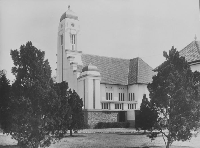 foto. Christelijke kerk, vermoedelijk in Batavia